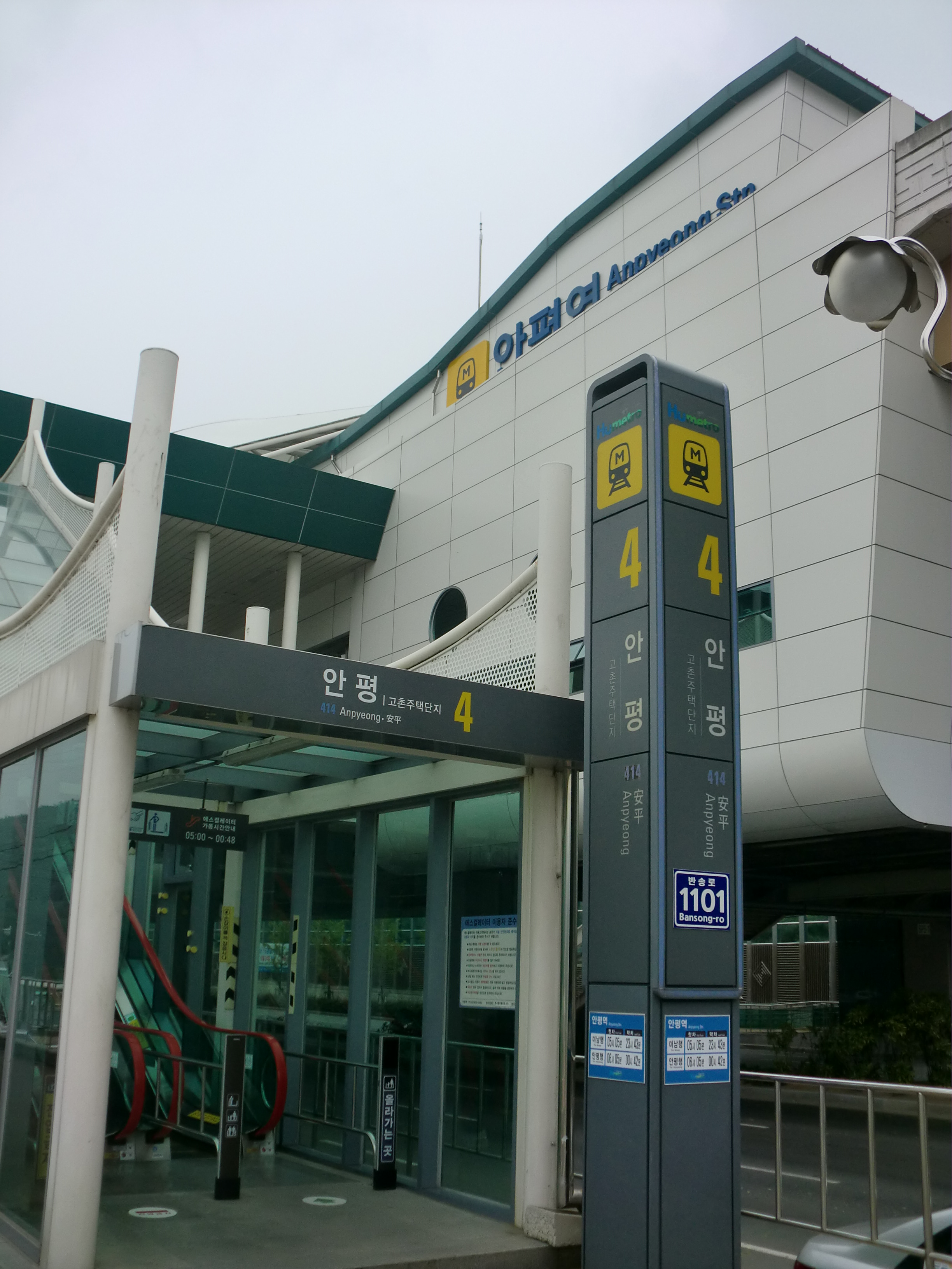 부산도시철도 4호선 안평역 4번출구